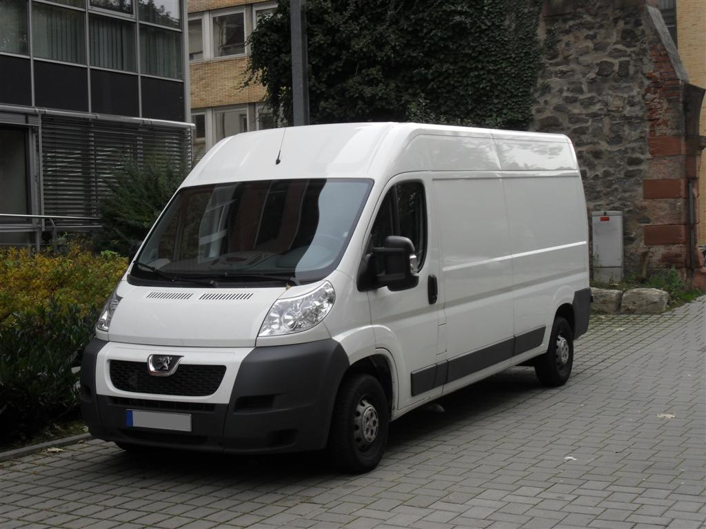 Peugeot Boxer Transport (seit 2006)